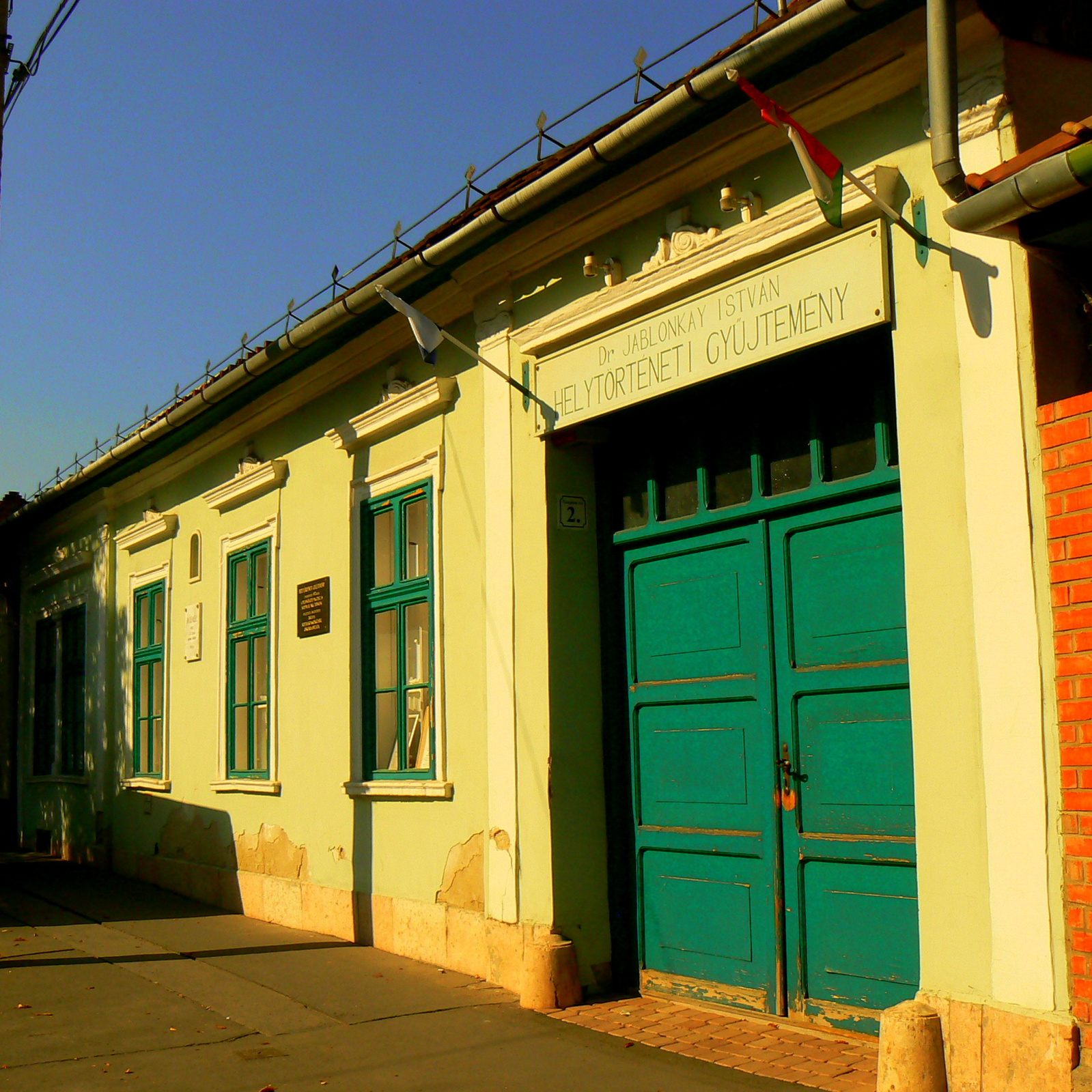 Helytörténeti Gyűjtemény épülete, volt lakóház (Solymár, Templom tér 2.) This is a photo of a monument in Hungary. Identifier: 7303